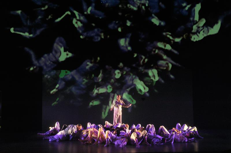 Foto Eröffnungsinszenierung Homo Empathicus, Deutsches Theater Göttingen, 2014, Regie: Erich Sidler, Text: Rebecca Kricheldorf